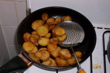 Aardappels bij Känsterle in de pan. Vrij te gebruiken ;)